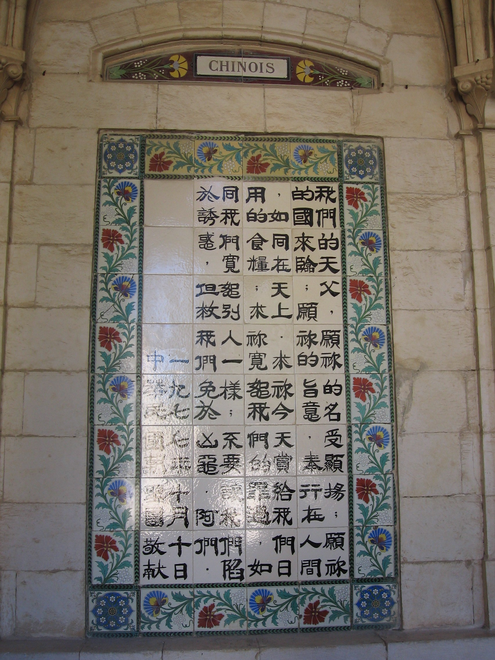 Chiesa del Padre Nostro, a Gerusalemme. Preghiera in cinese